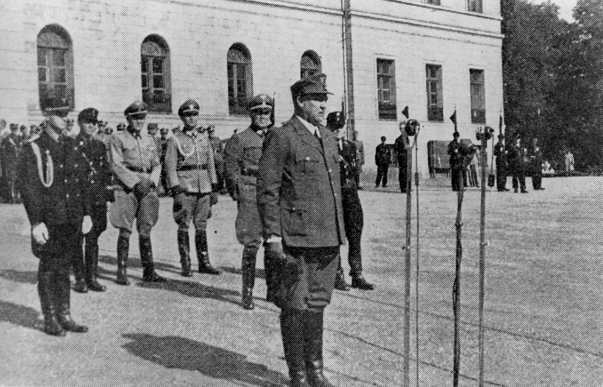 Orginal bildetittel: Førerens tale til Germanske SS Norge RA/PA-1209/Ue 91/ (img036)